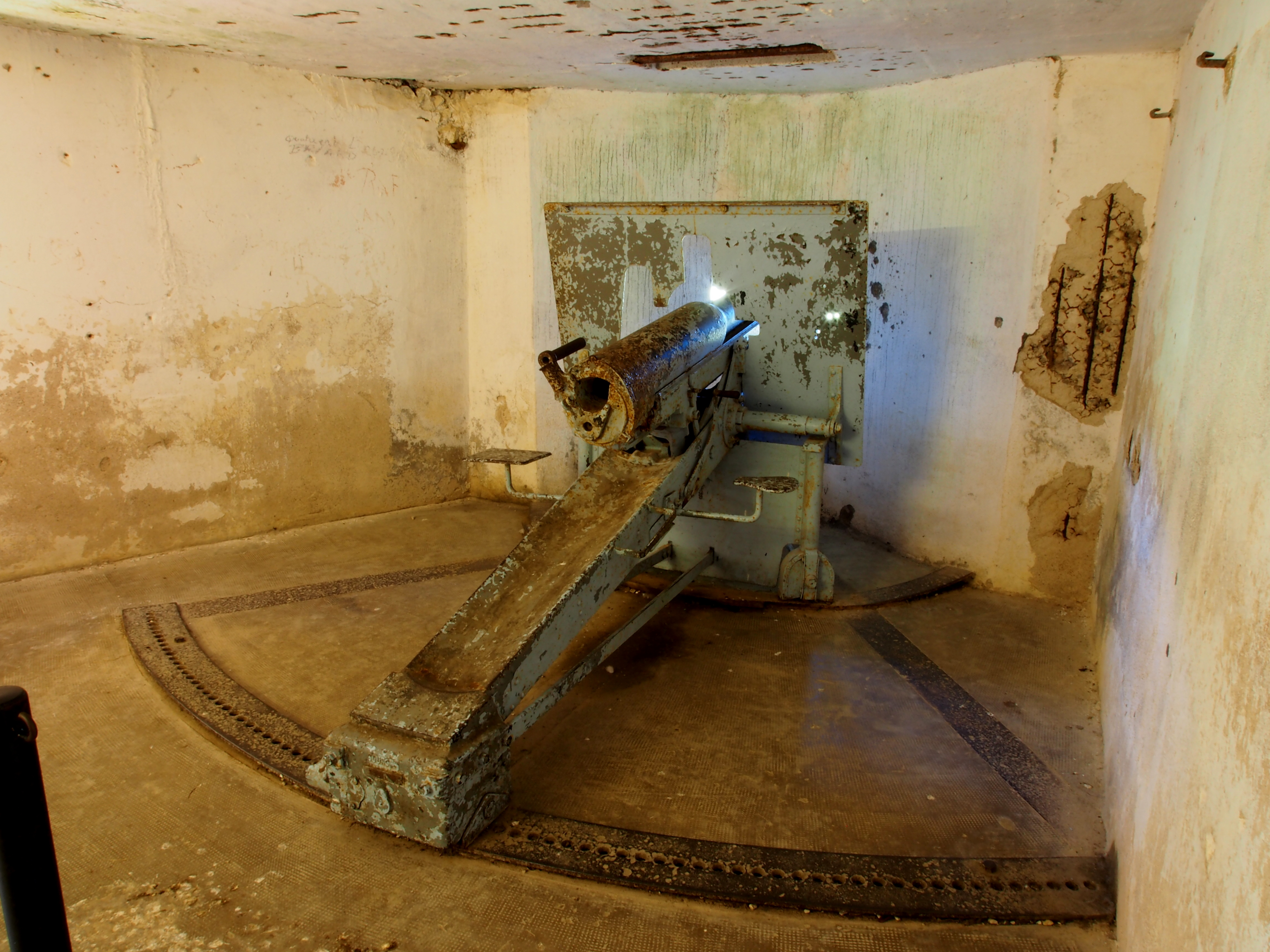 Fort de Vaux kazemat cannon